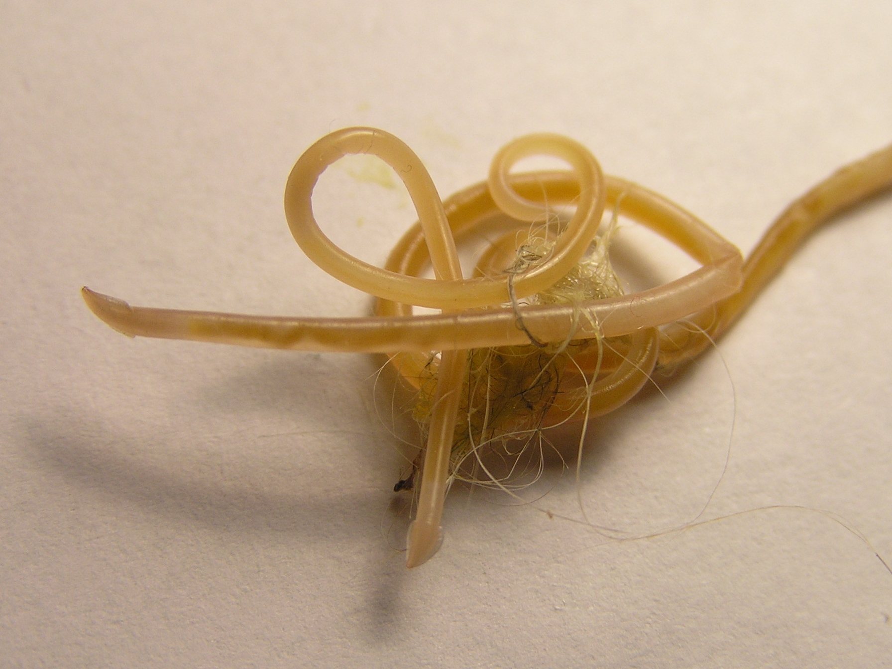 Toxocara cati, Glista kocia, Białowieża, Polska